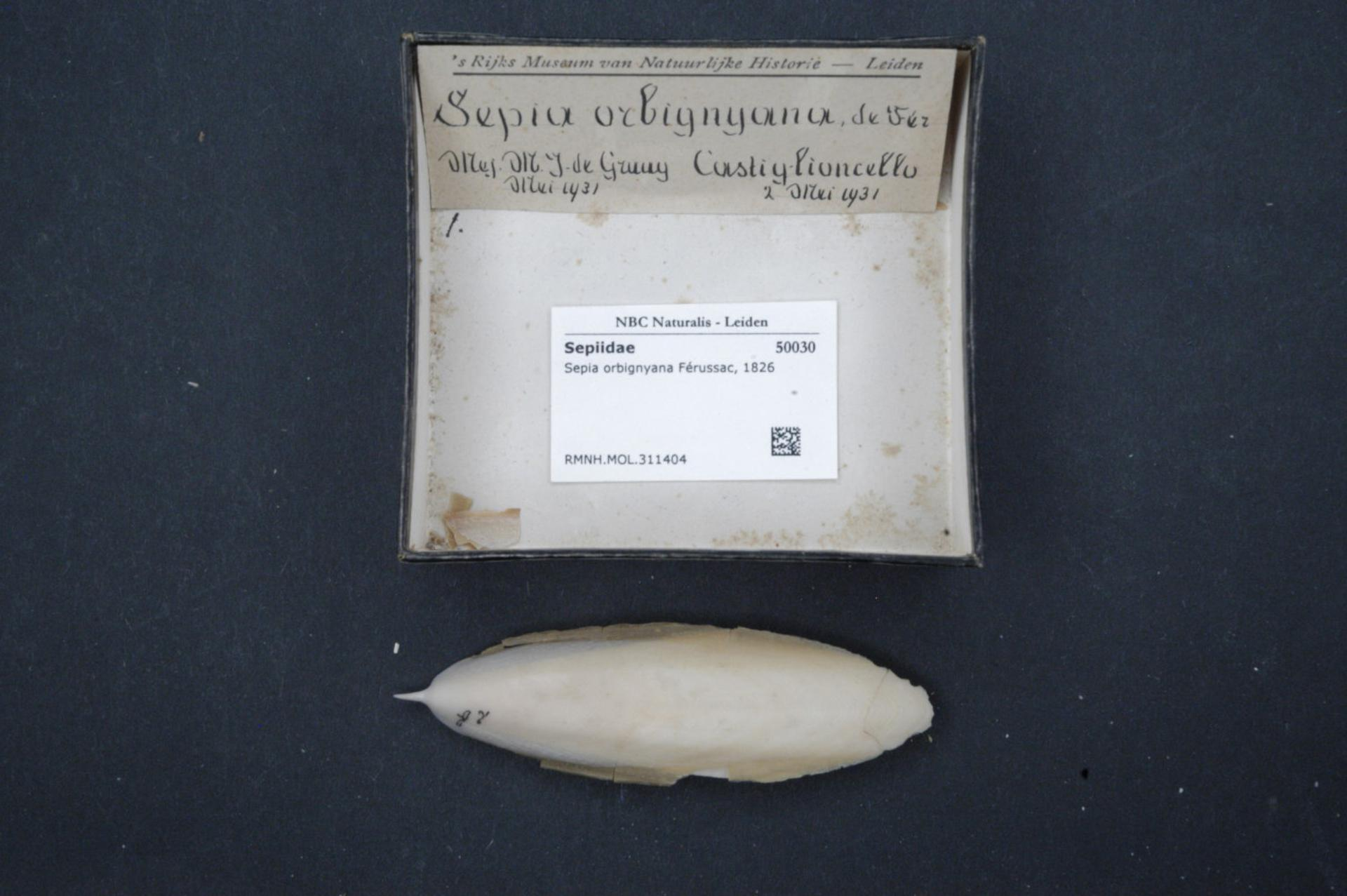 Sepia orbignyana Férussac, 1826